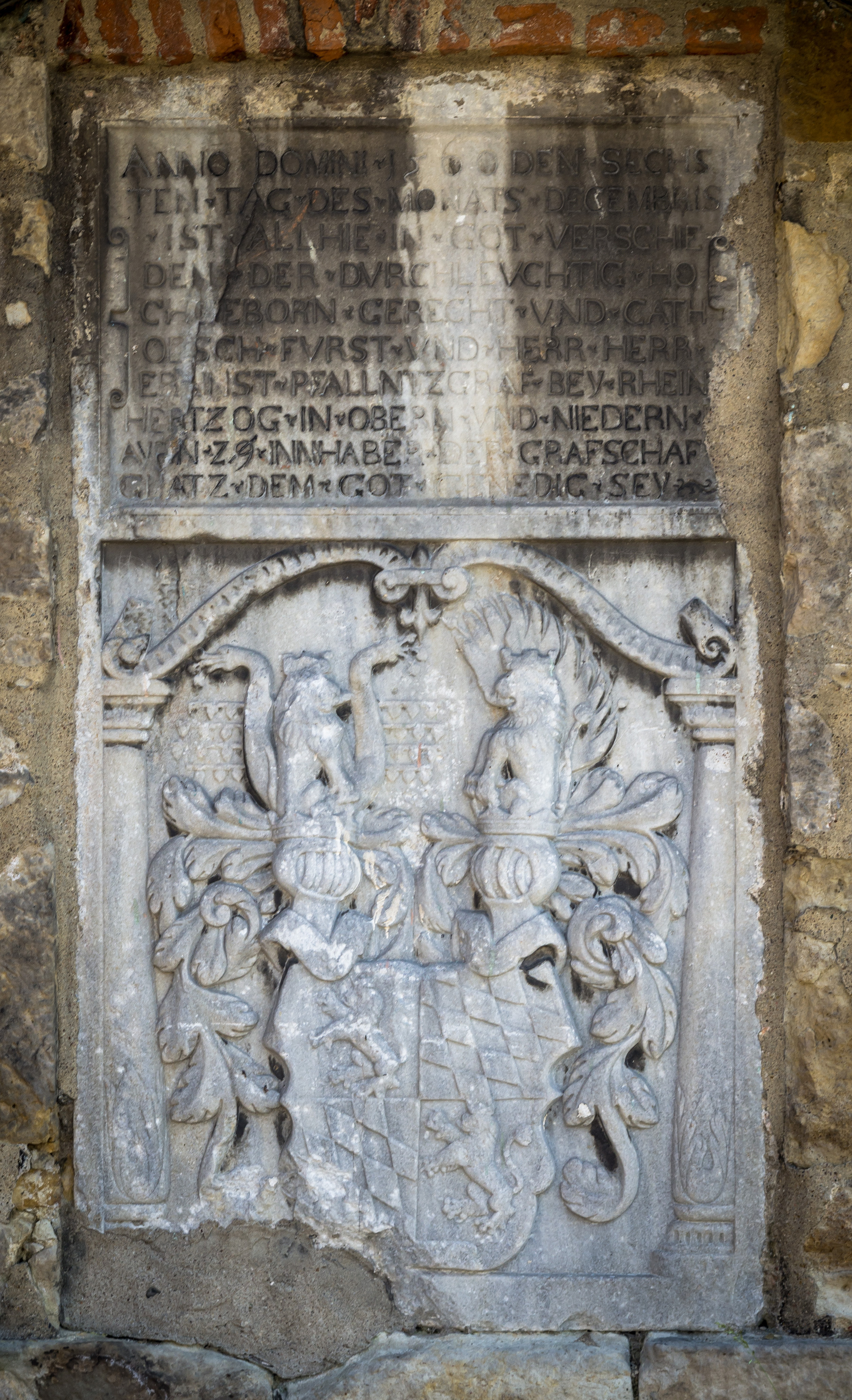 Kłodzko - twierdza This photo of Lower Silesian Voivodeship was taken during Wikiexpedition 2013 set up by Wikimedia Polska Association.You can see all photographs in category Wikiekspedycja 2013.